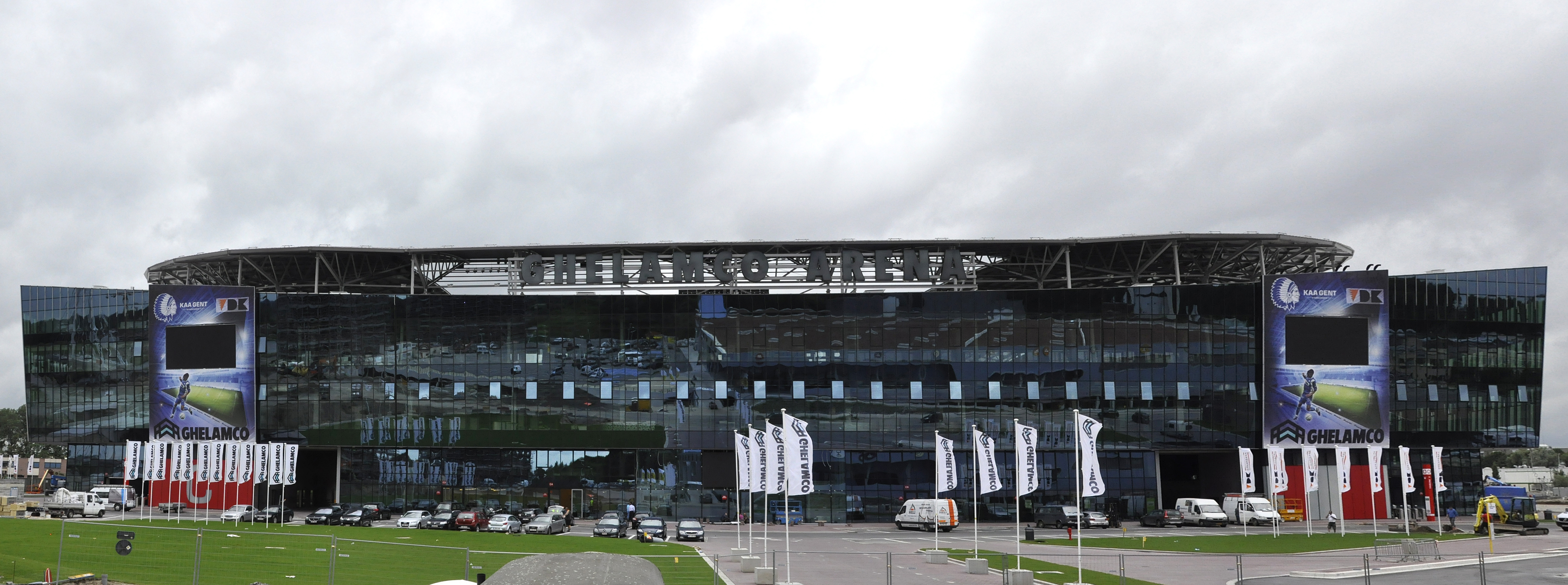 De Ghelamco-Arena, te Gent, België, stadion van KAA Gent